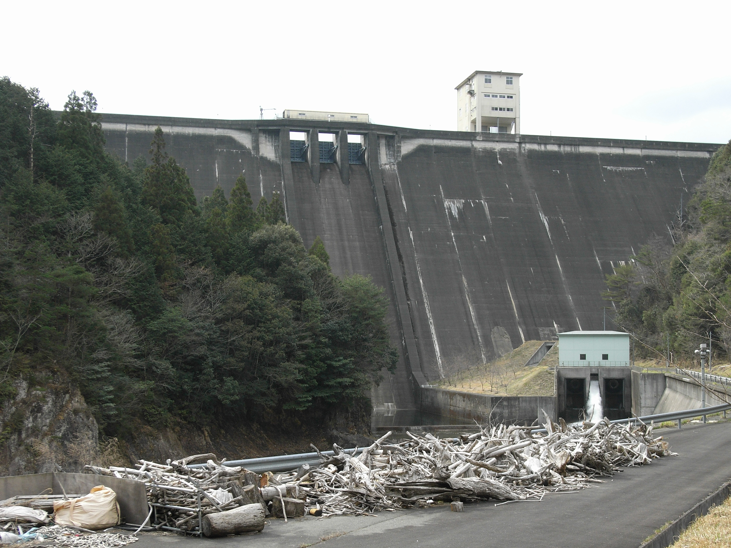 Dam